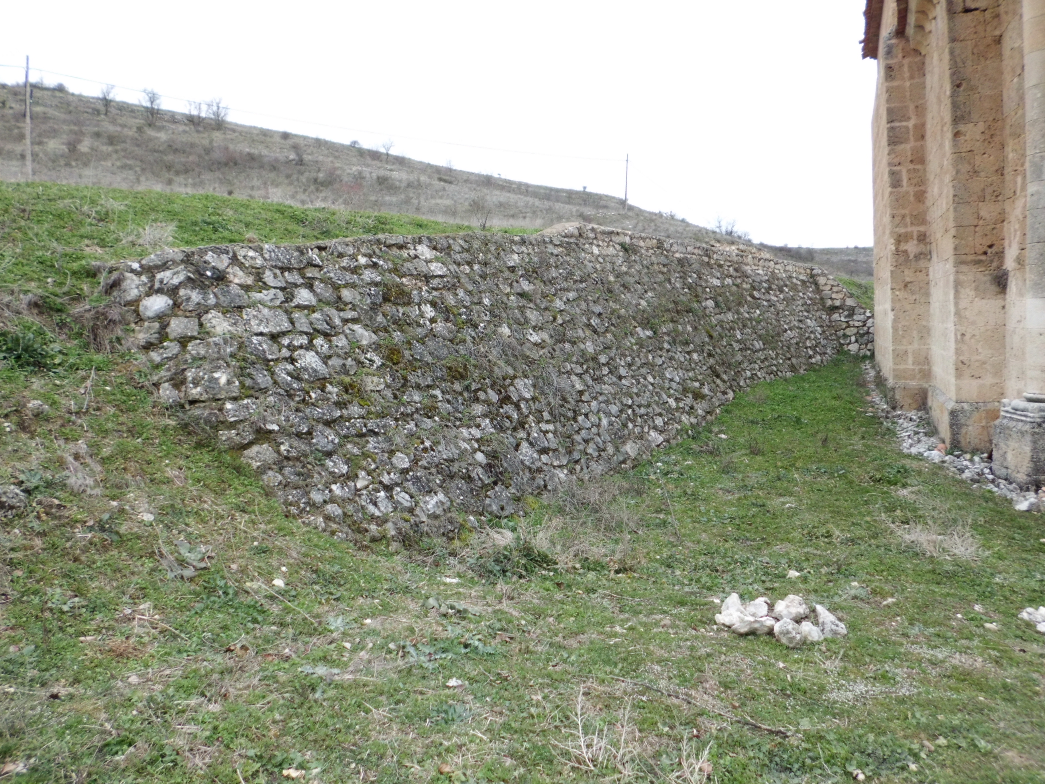 Ermita románica de de San Vicente en el término de Fuentesoto en Segovia, España. Finales del siglo XIII y principios del XIV. Muro de contención para protegerla.